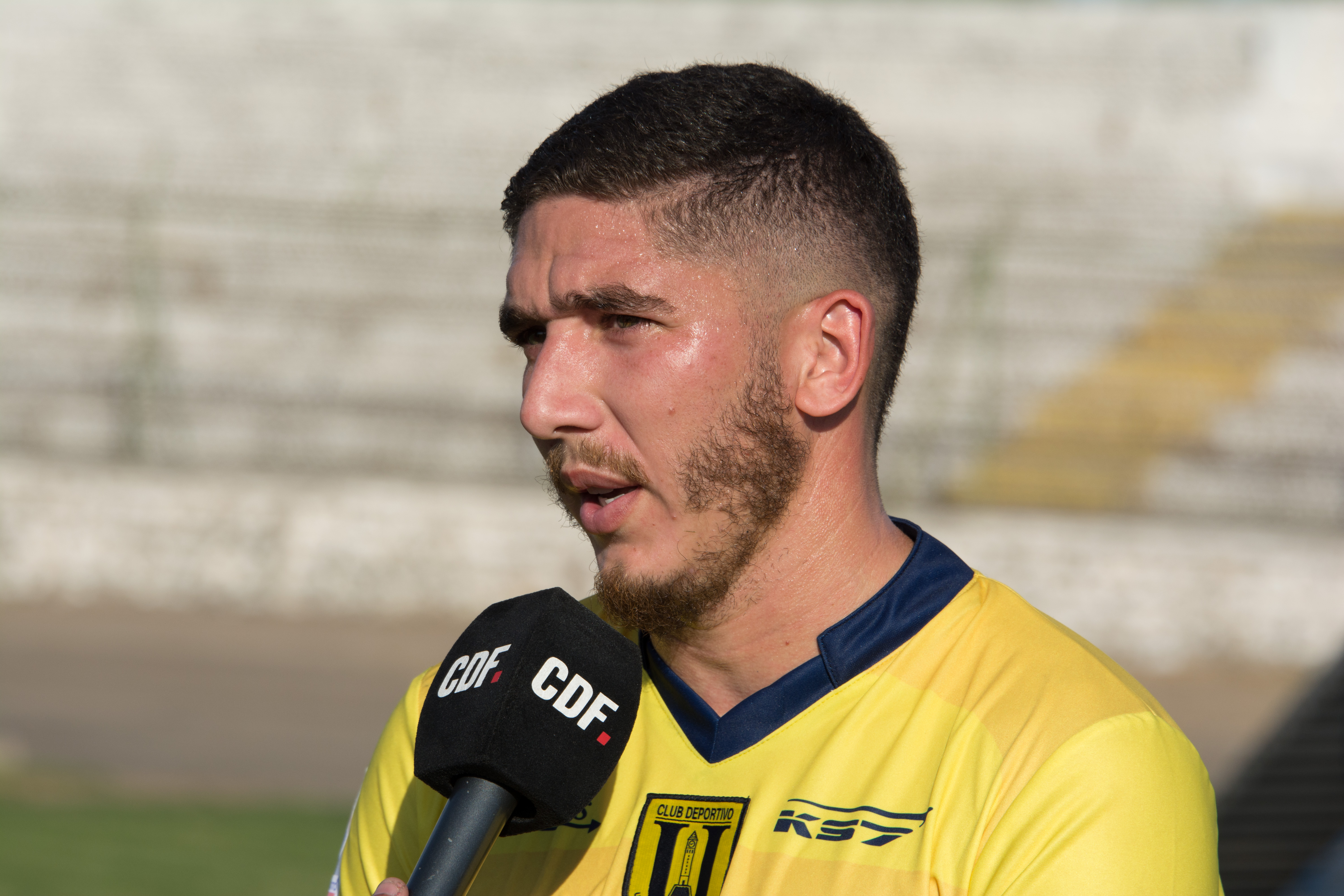 Santiago Silva, Palestino v Universidad de Concepción, Estadio Municipal de La Cisterna, La Cisterna, Santiago, Chile.